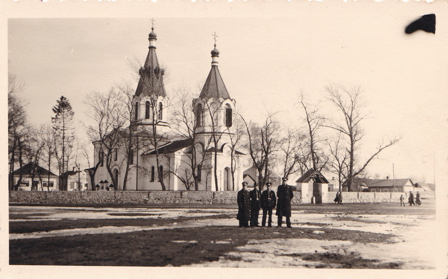 Беларуская (тарашкевіца): Маладэчна (Maładečna), рог вуліц Віленскай (vulica Vilenskaja) і Замкавай (vulica Zamkavaja). Пакроўская царква-мураўёўка